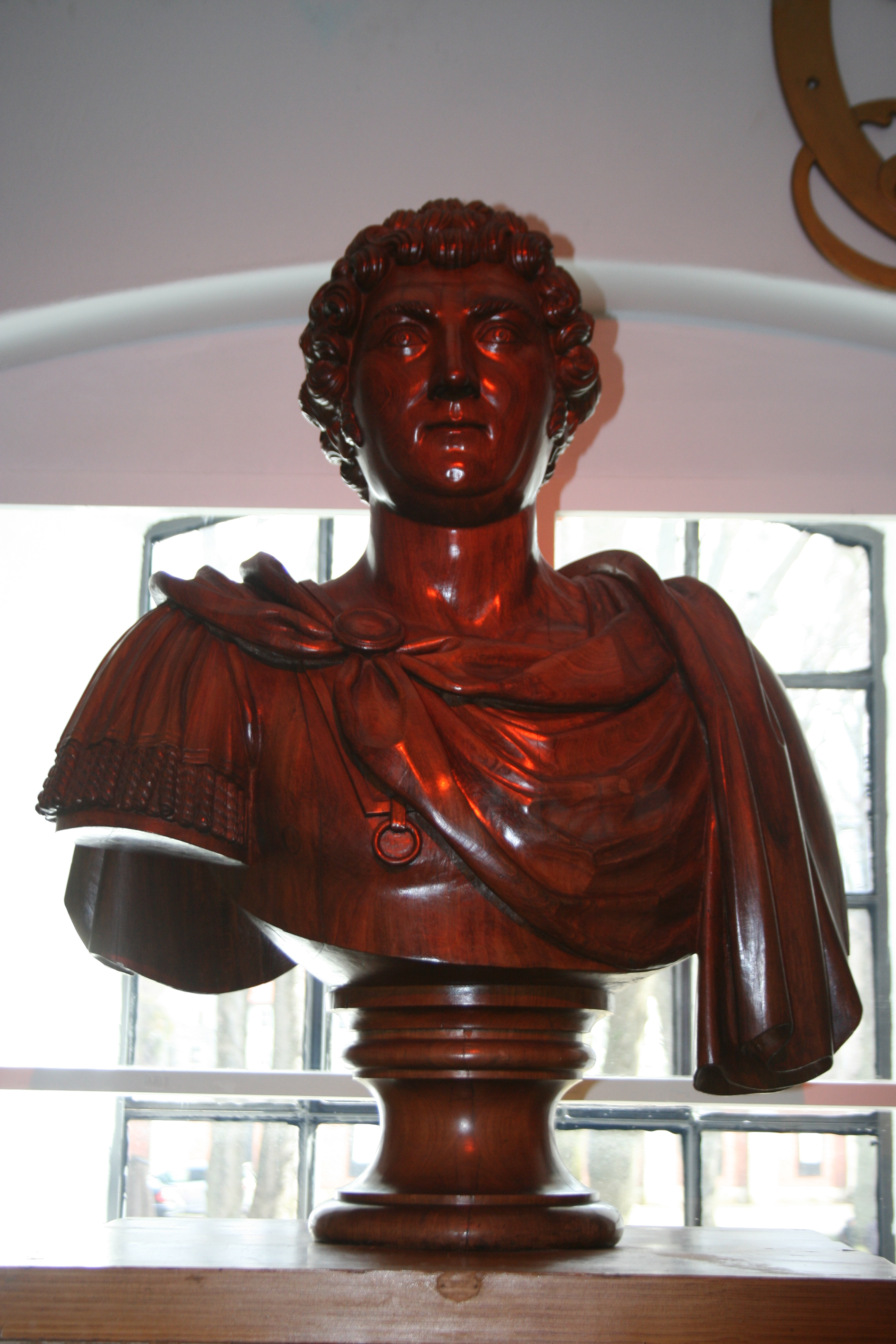 Byste av Karl Johan på Marinemuseet på Karljohansvern.